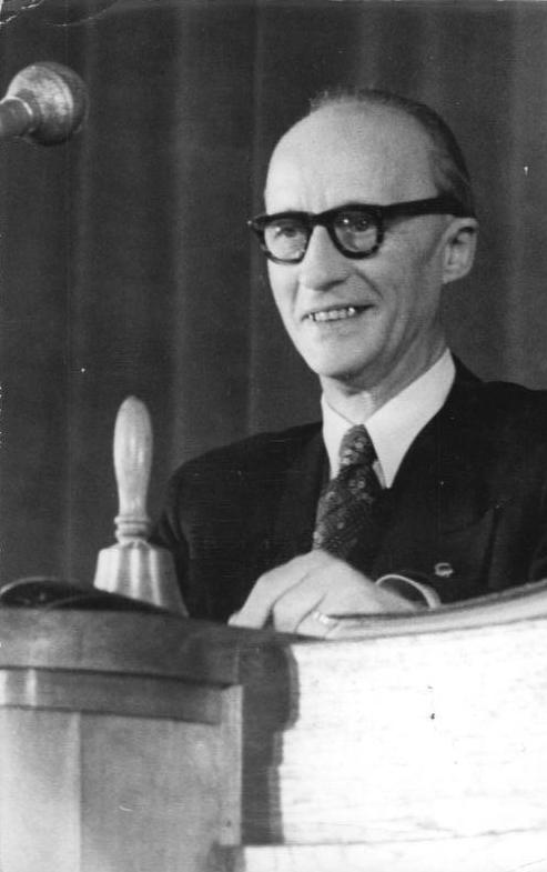 Illus Sturm 15.11.1950 II. Sitzung der Volkskammer am 15.11.1950. UBz: Johannes Dieckmann, Präsident der Vokskammer der DDR.